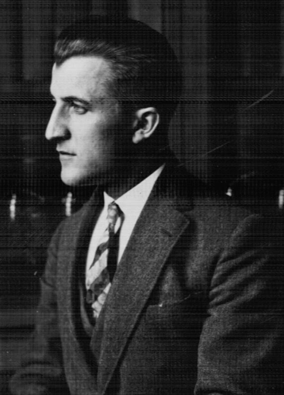 Fotografie z archivu jeho přítele Miloše Deyla